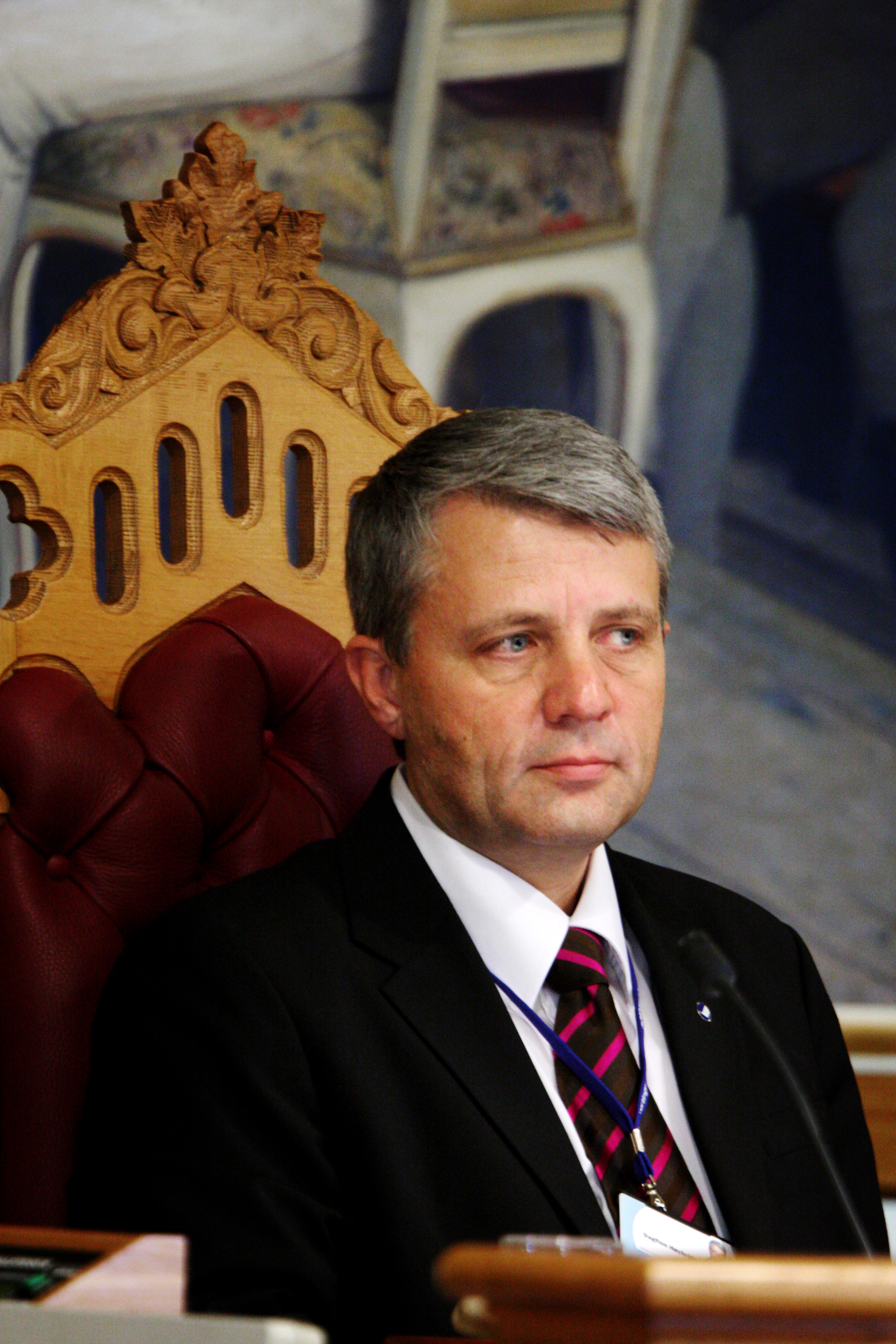 Presidiets ordförande Dagfinn Höybråten vid Nordiska Rådets session i Oslo. 2007-10-30. Foto: Magnus Fröderberg/norden.org